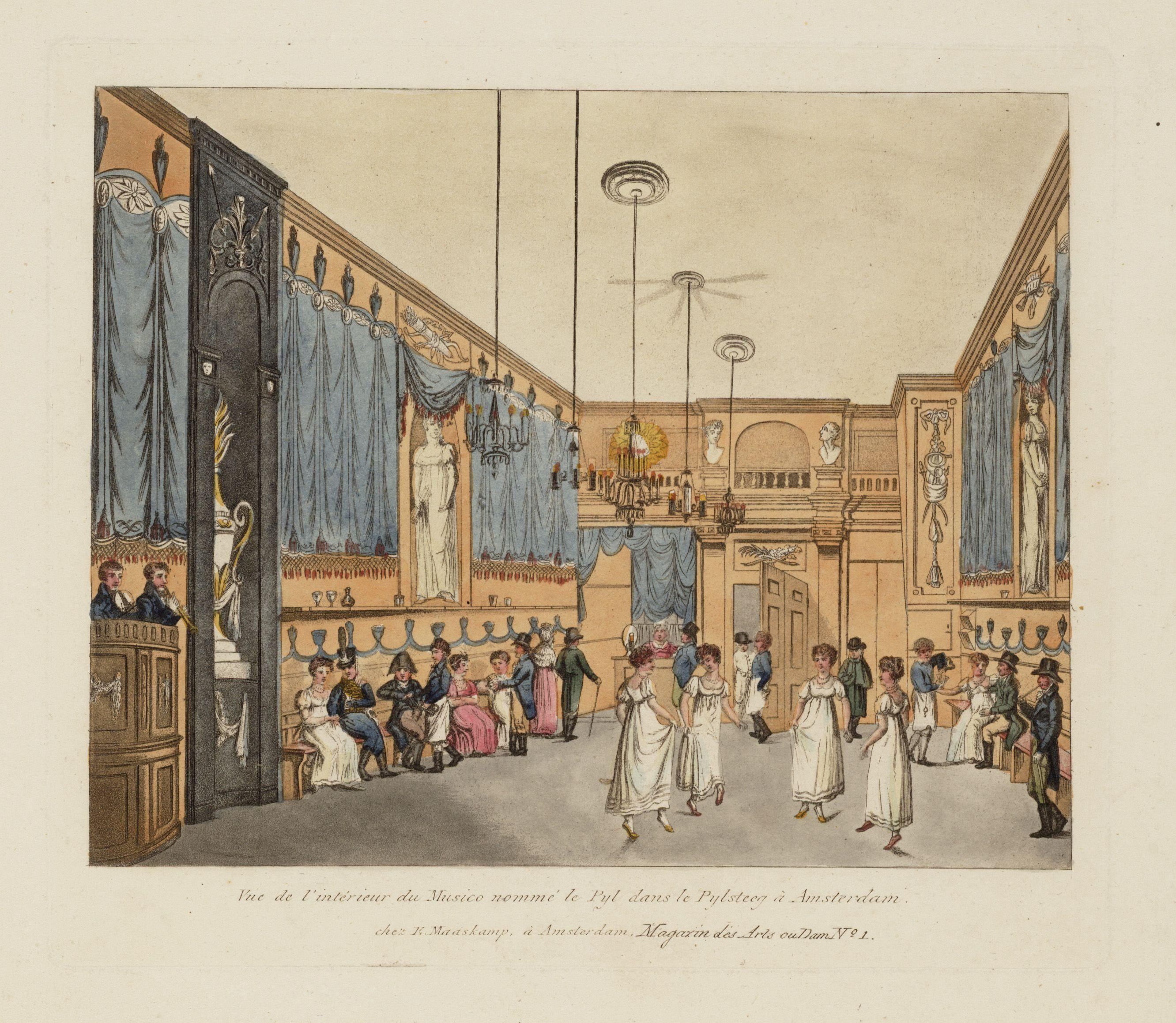 Beschrijving Vue de lintérieur du Musico nommé le Pyl dans le Pylsteeg à Amsterdam Soirée in het befaamde muziek en speelhuis De Pijl in de Pijlsteeg op nummer 27. Prent. techniek: ets en aquatint, handgekleurd. Documenttype prent Vervaardiger Maaskamp, E. (Evert; 1769-1834) Collectie Collectie Atlas Dreesmann Datering 1808 Geografische naam Pijlsteeg Inventarissen Afbeeldingsbestand 010094003620 Generated with Dememorixer